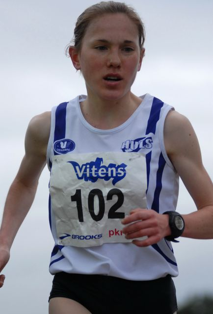 Nathalie De Vos during Sylvestercross 2007 (Prominenten)